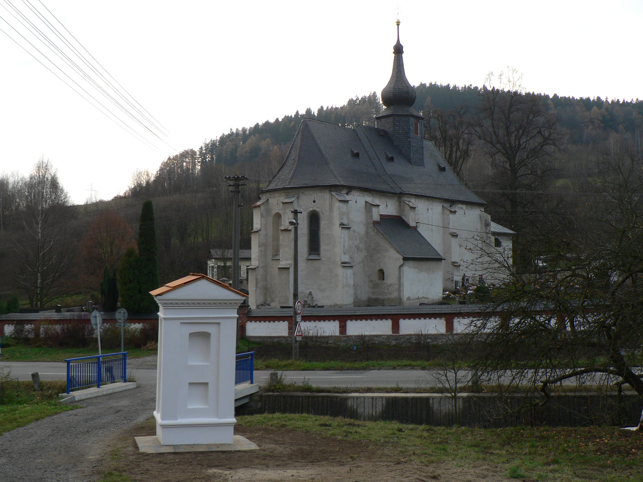 Kostel Všech svatých (Bratrušov), závěr